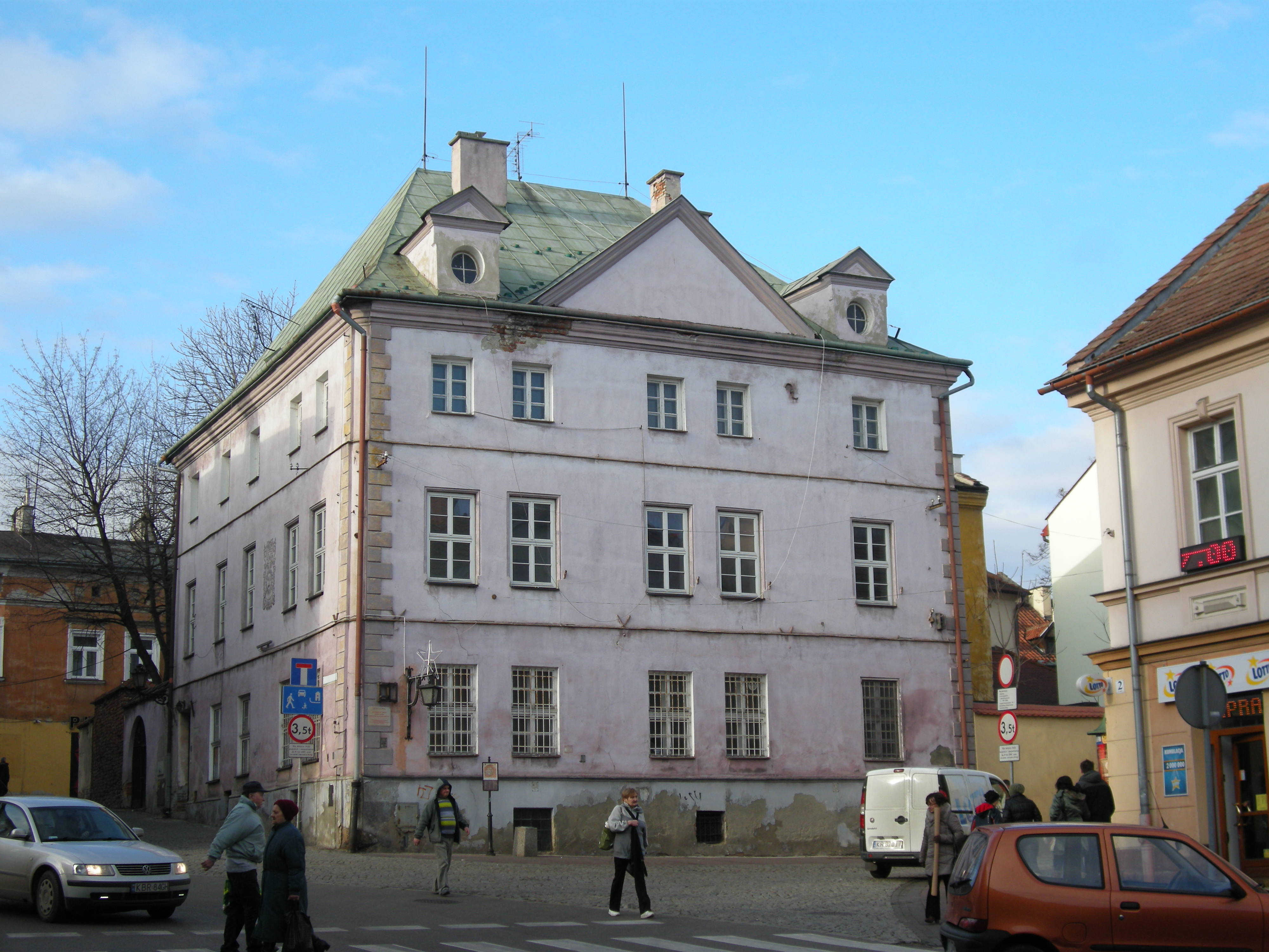 Klasycystyczny dom przy ul. Brama Pilzneńska